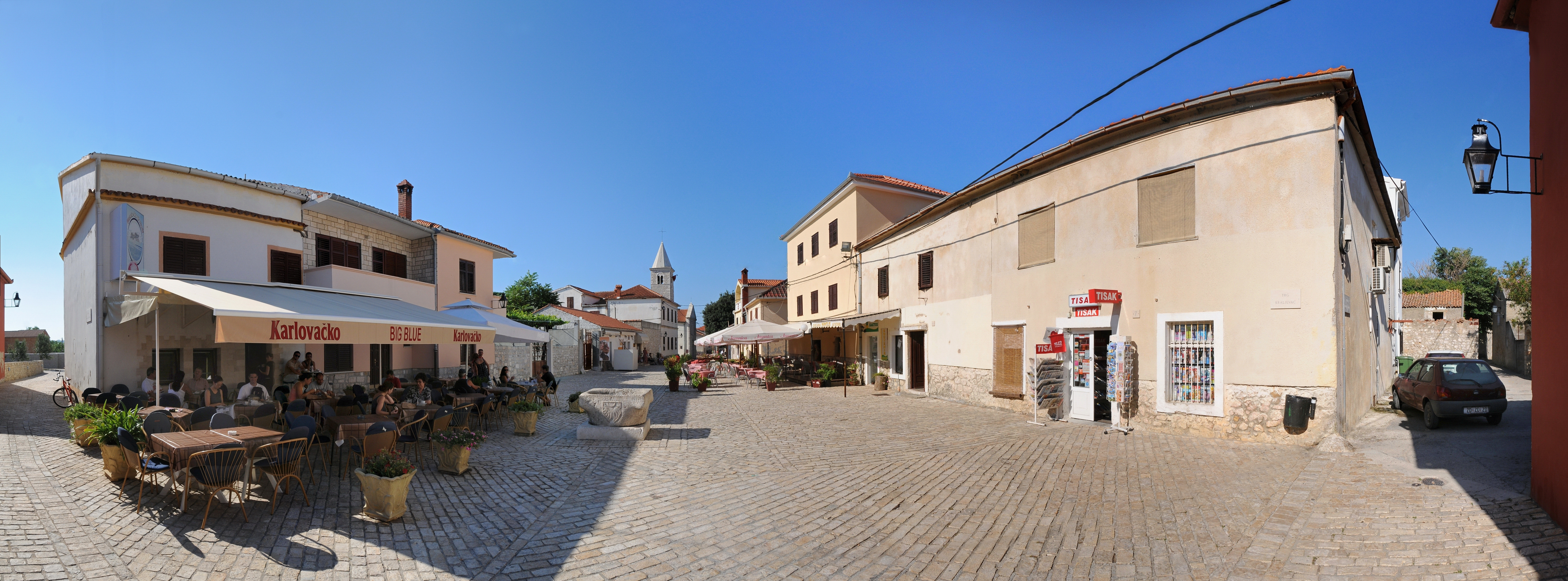 Panorama mit mehreren Bilder in der Fußgängerzone von Nin.